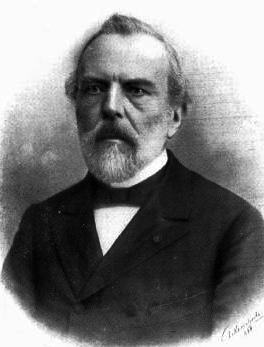 François Folie est un astronome belge né à Venlo le 11 décembre 1833 et décédé à Liège le 29 janvier 1905.